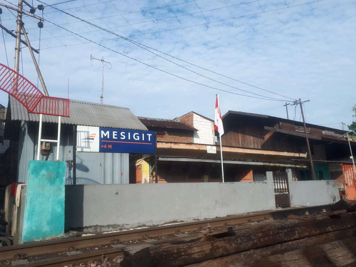 Tampak luar Stasiun Mesigit tahun 2020